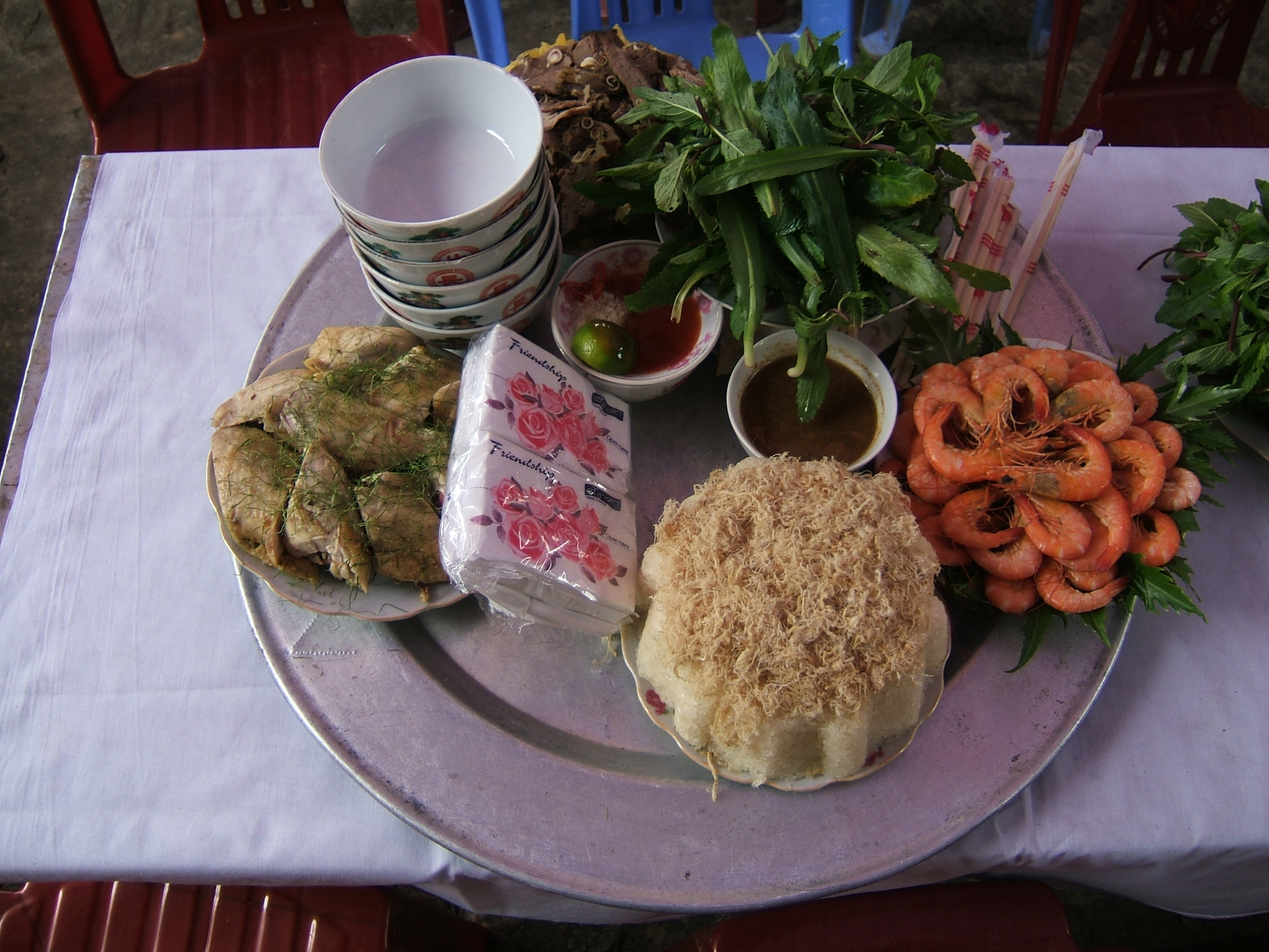 Một mâm cỗ cưới người Việt tại Tiên Lãng, Hải Phòng với xôi trắng ăn kèm ruốc; tôm hấp, gà luộc, thịt bê, rau sống